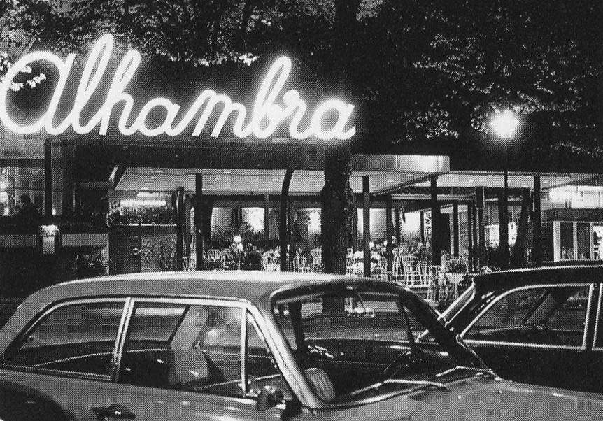 Nya Alhambra på Djurgården